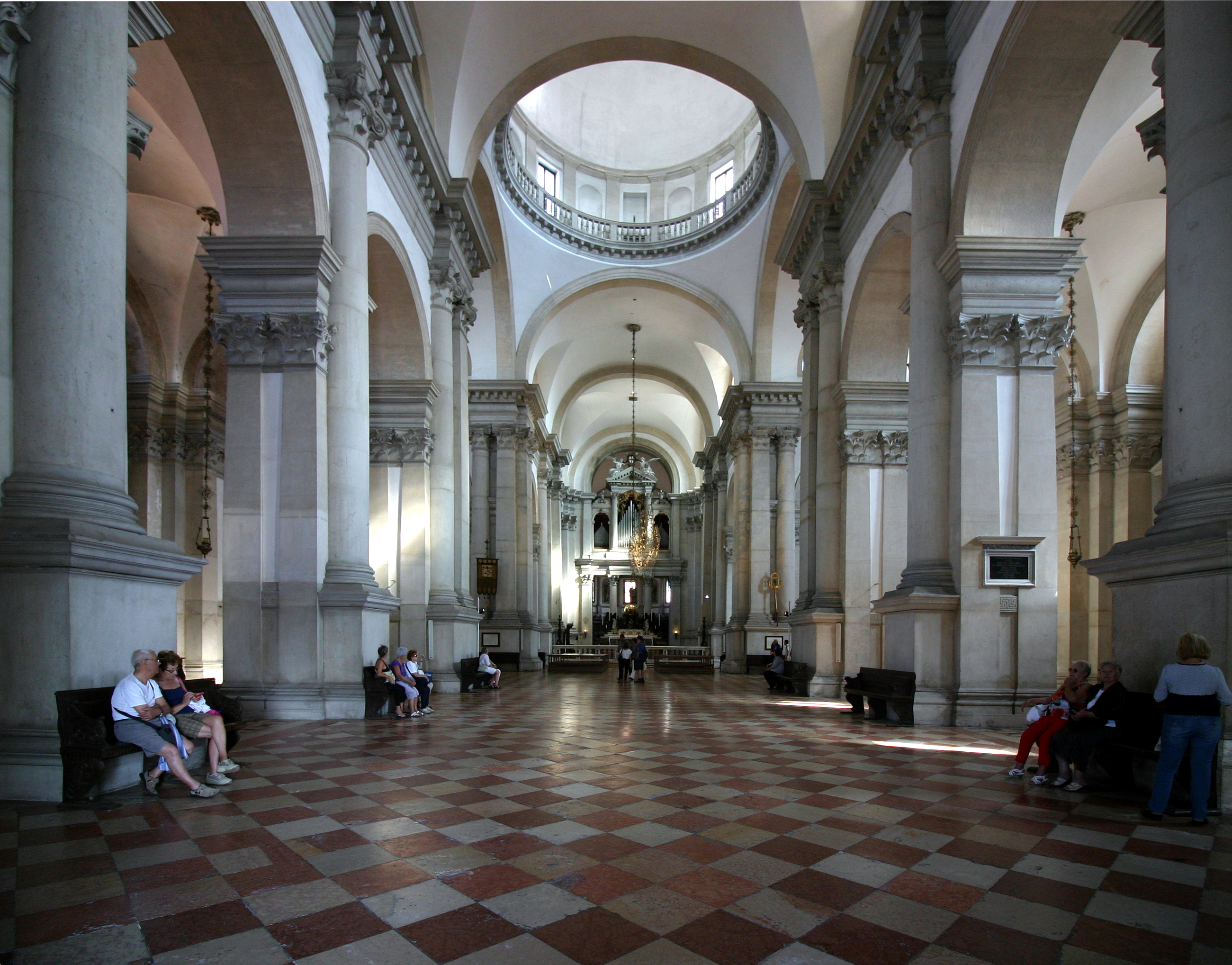 San Giorgio Maggiore - Venice